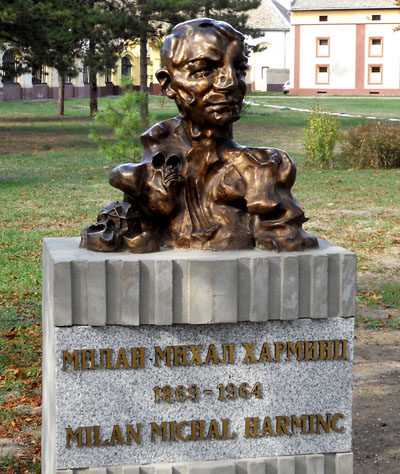 Srpskohrvatski / српскохрватски: Spomenik Milanu Mihalu Harmincu arhitekti iz Kulpina koji je delo Lasla Silađija i postavljen je 2012. godine